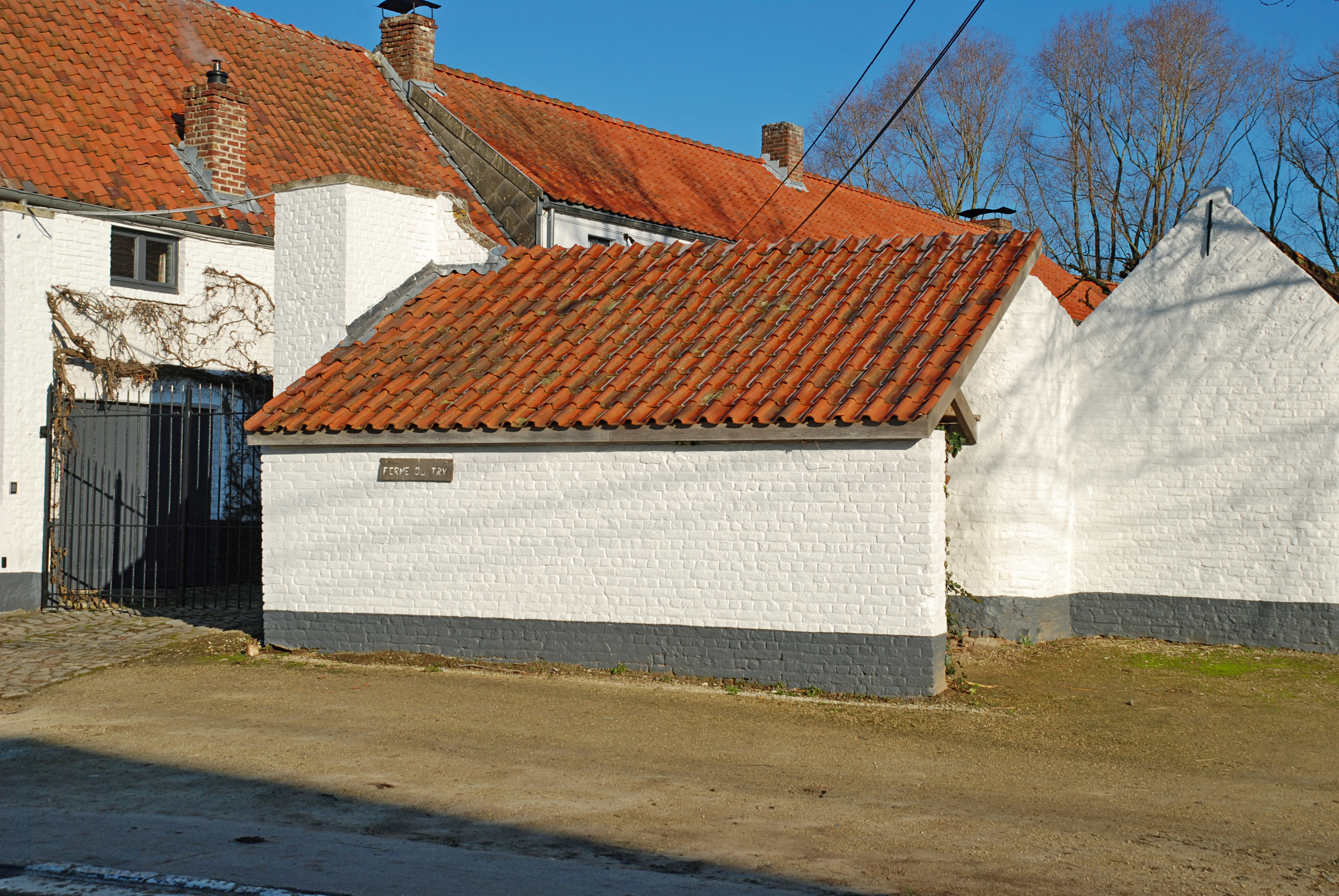 Belgique - Ottignies-Louvain-la-Neuve - Céroux - Ferme du Try